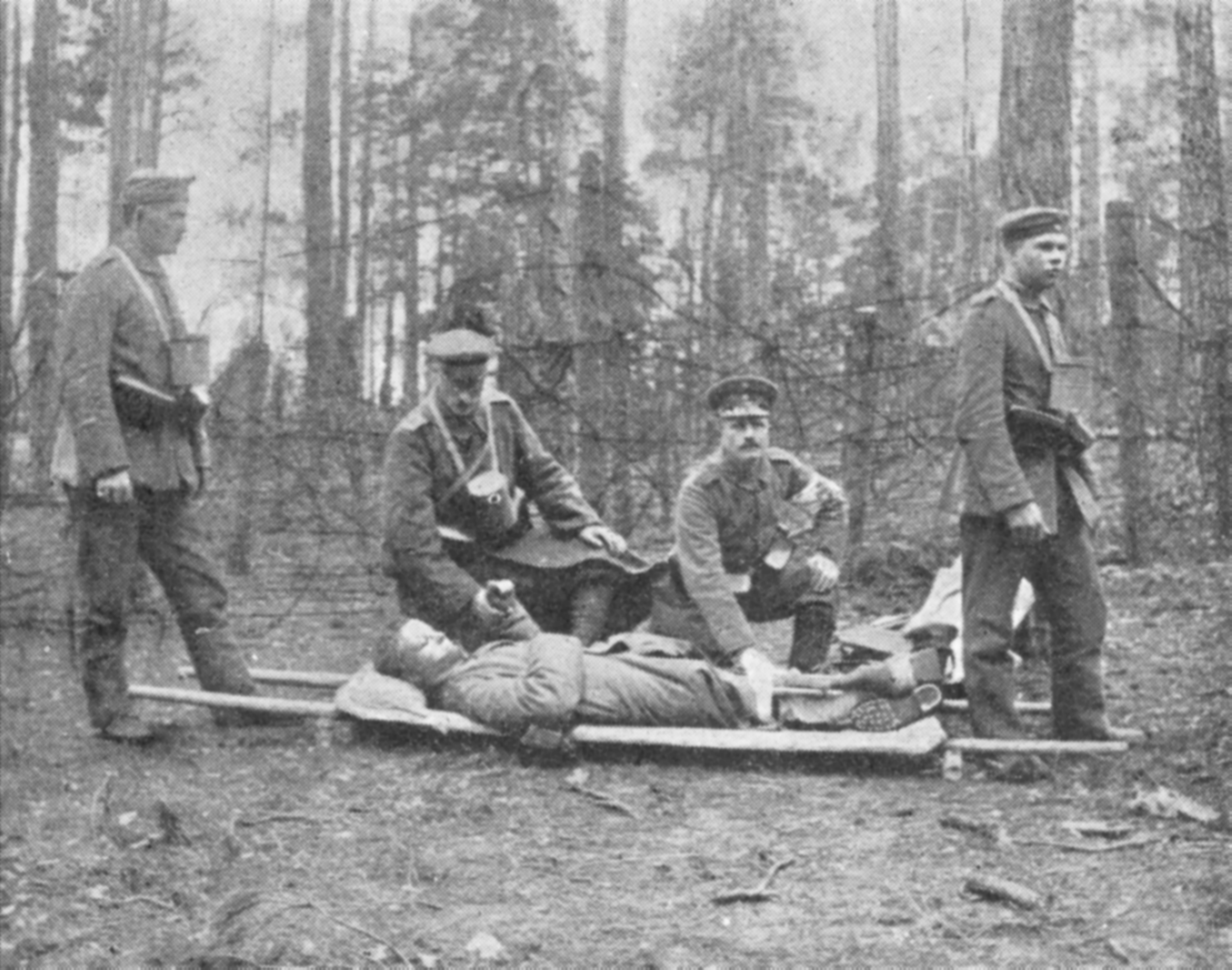 Jääkäripataljoona 27:n saniteettikurssilaisia Libaussa vuonna 1917.